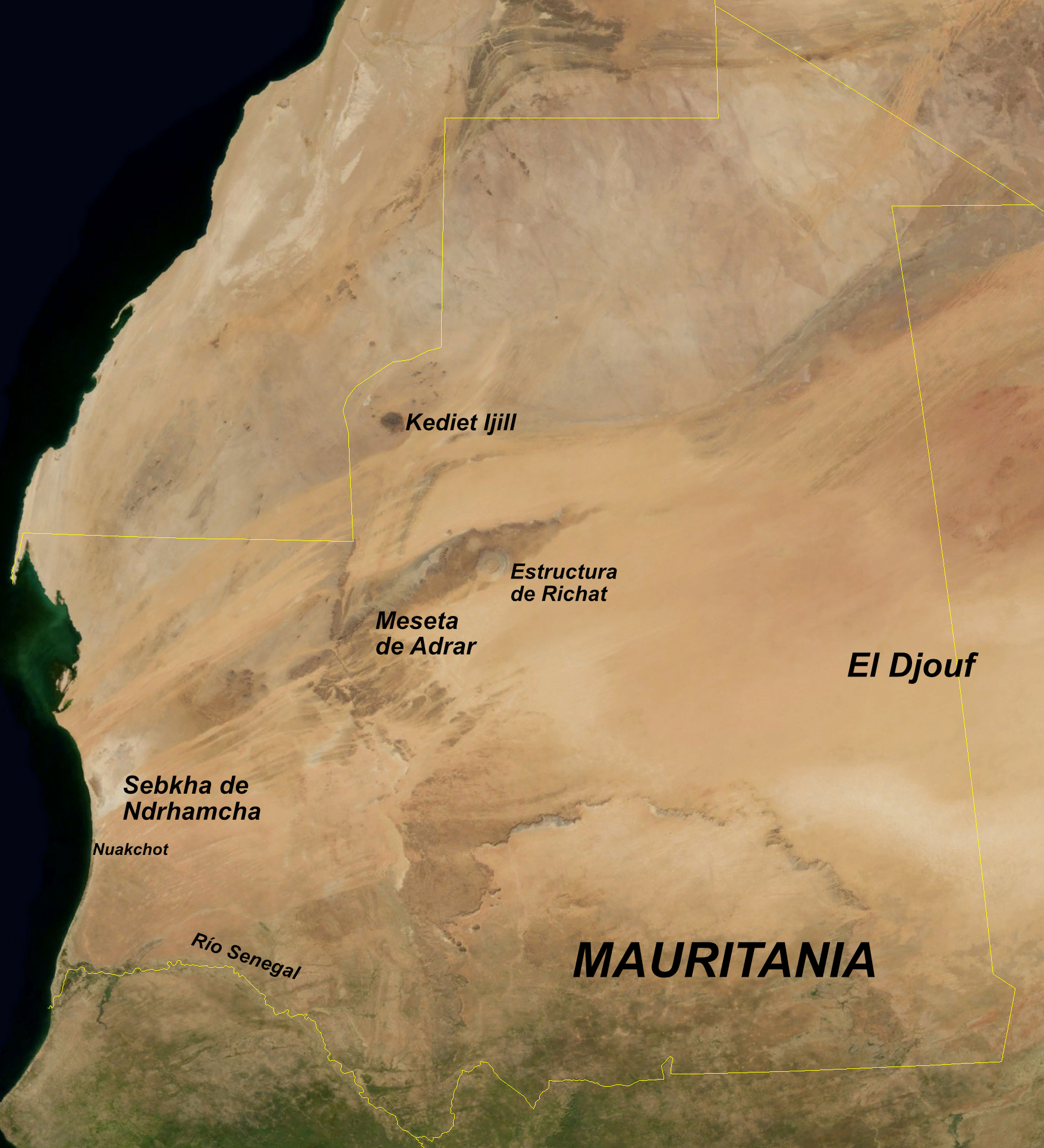 Mauritania vista desde satélite